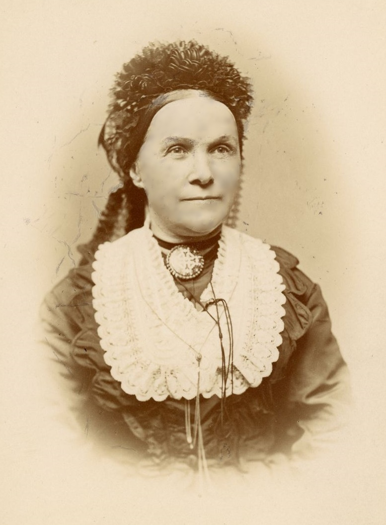 Ercsey Julianna portréja